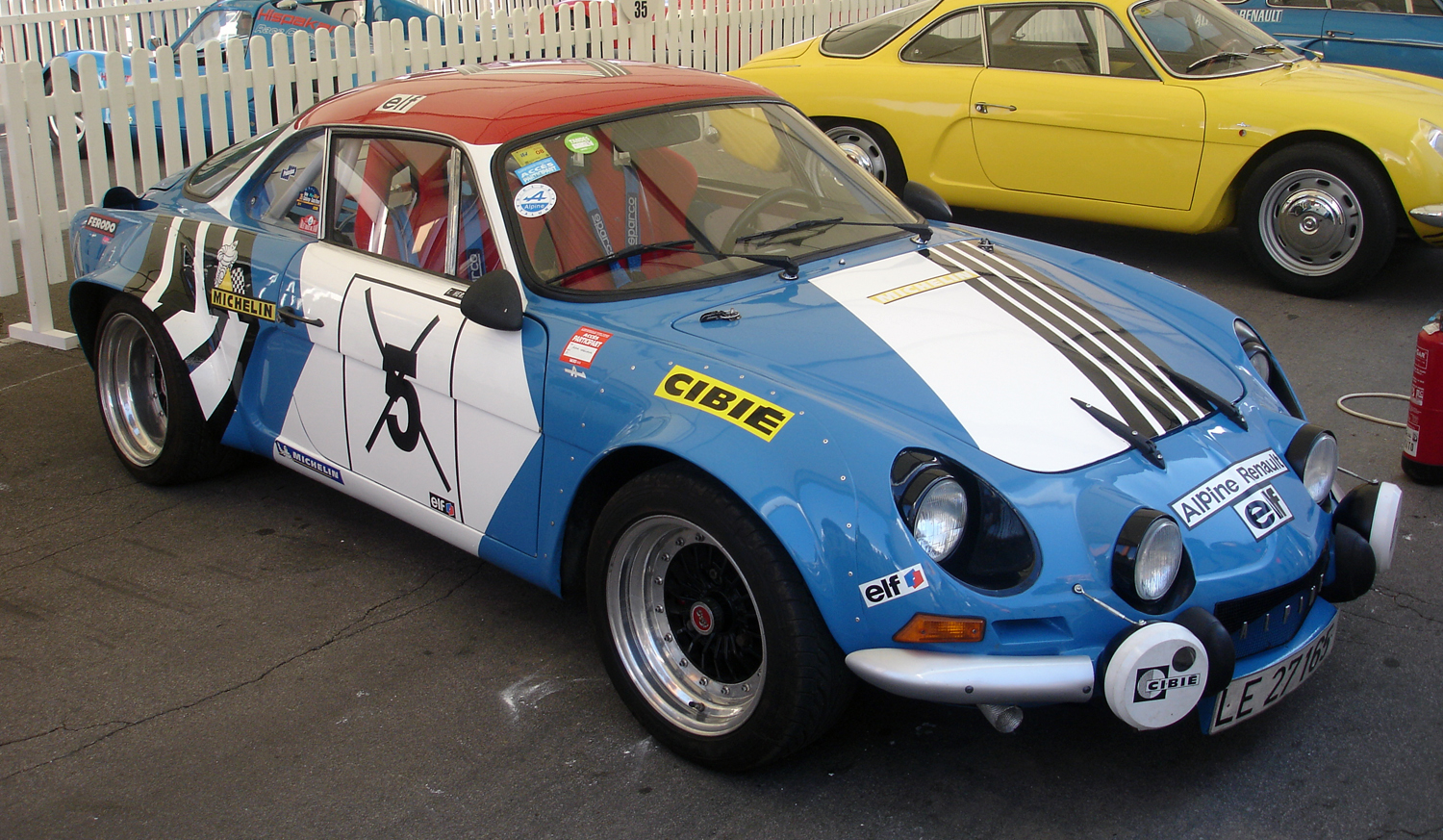 Alpine A110 1600, exposat al festival Martini Legends (commemoració del 75 aniversari del Circuit de Montjuïc)